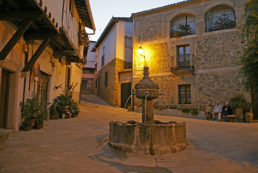 Representa la Plaza Fuente de los chorros al anochecer en Cuacos de Yuste (Cáceres)